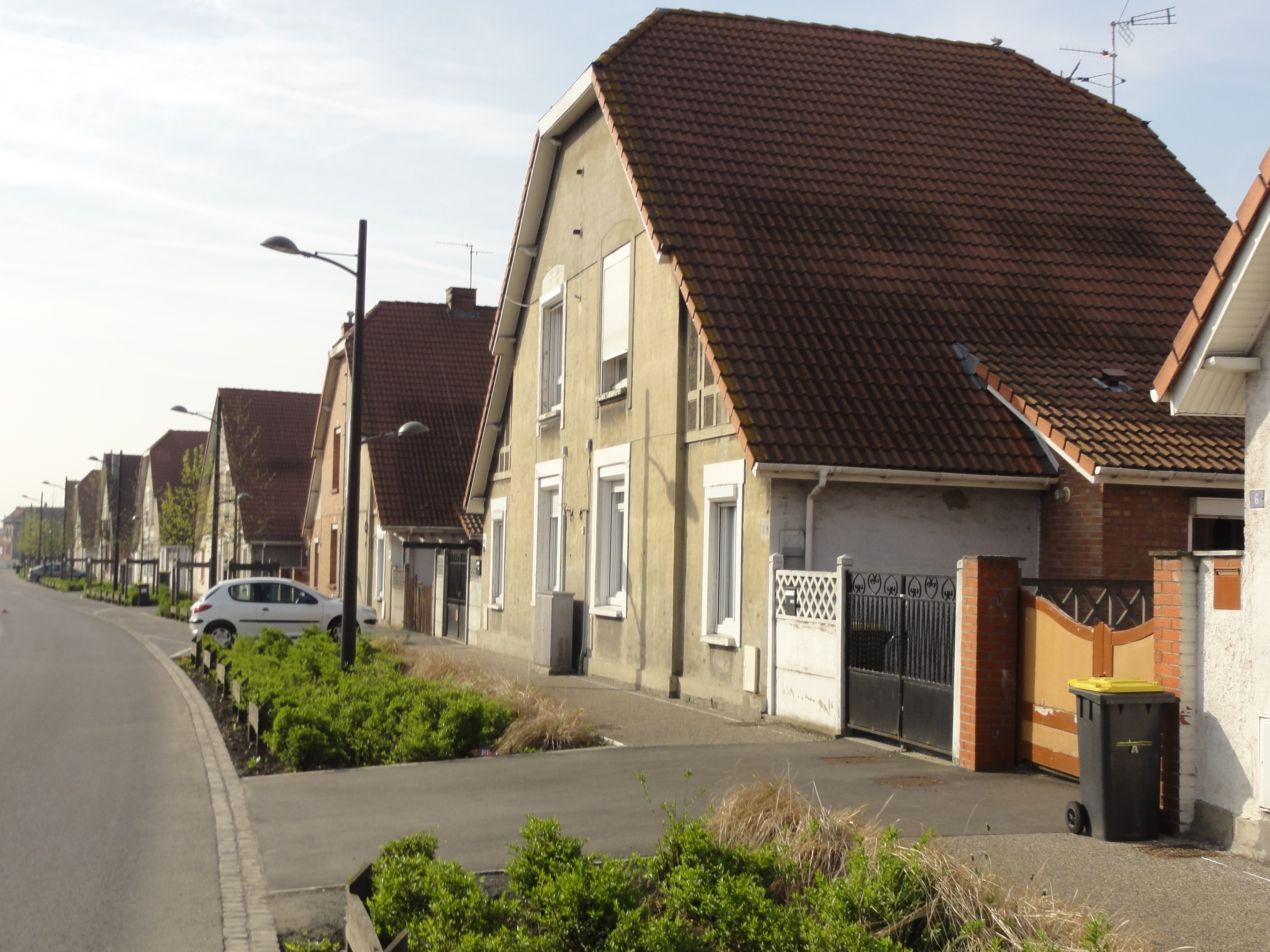 Cité Declercq de la fosse n° 9 - 9 bis de la Compagnie des mines de Dourges dans le bassin minier du Nord-Pas-de-Calais, Oignies, Pas-de-Calais, Nord-Pas-de-Calais, France. La cité Declercq est inscrite sur la liste du patrimoine mondial de l'Unesco le 30 juin 2012 et y constitue en partie le site no 42.